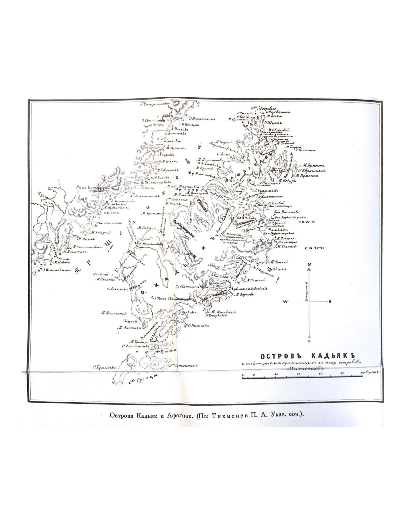 Данное изображение было взято из книги Русская Америка в неопубликованных записках К. Т. Хлебникова